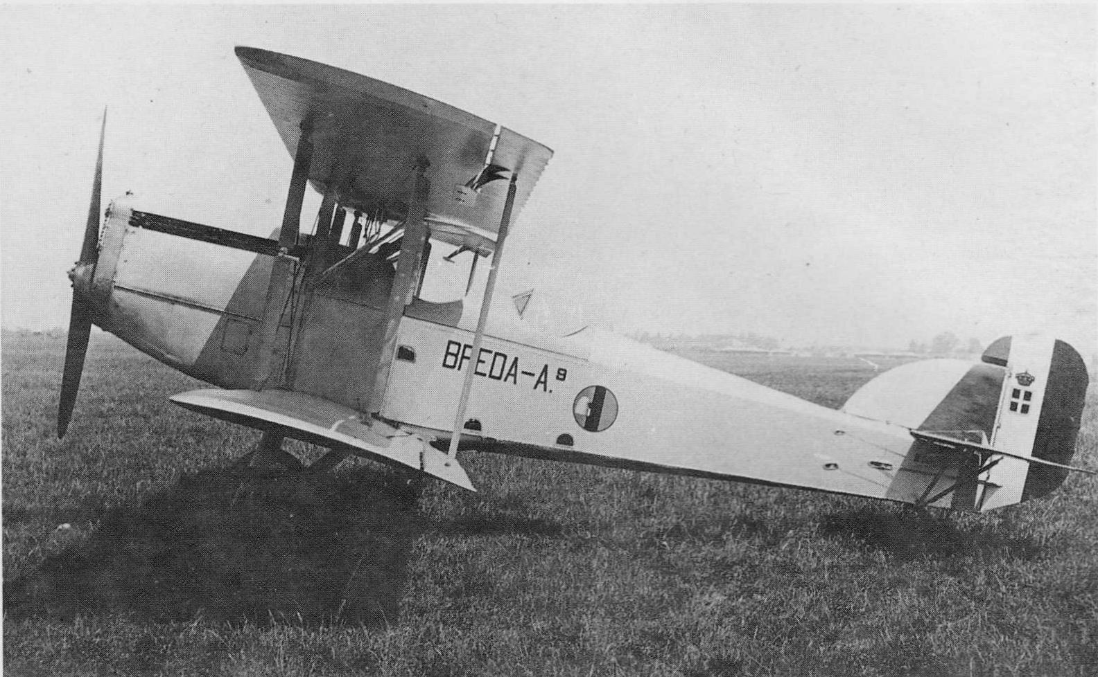 Breda A.9, aereo da addestramento monomotore biplano, data e luogo della scatto imprecisati.